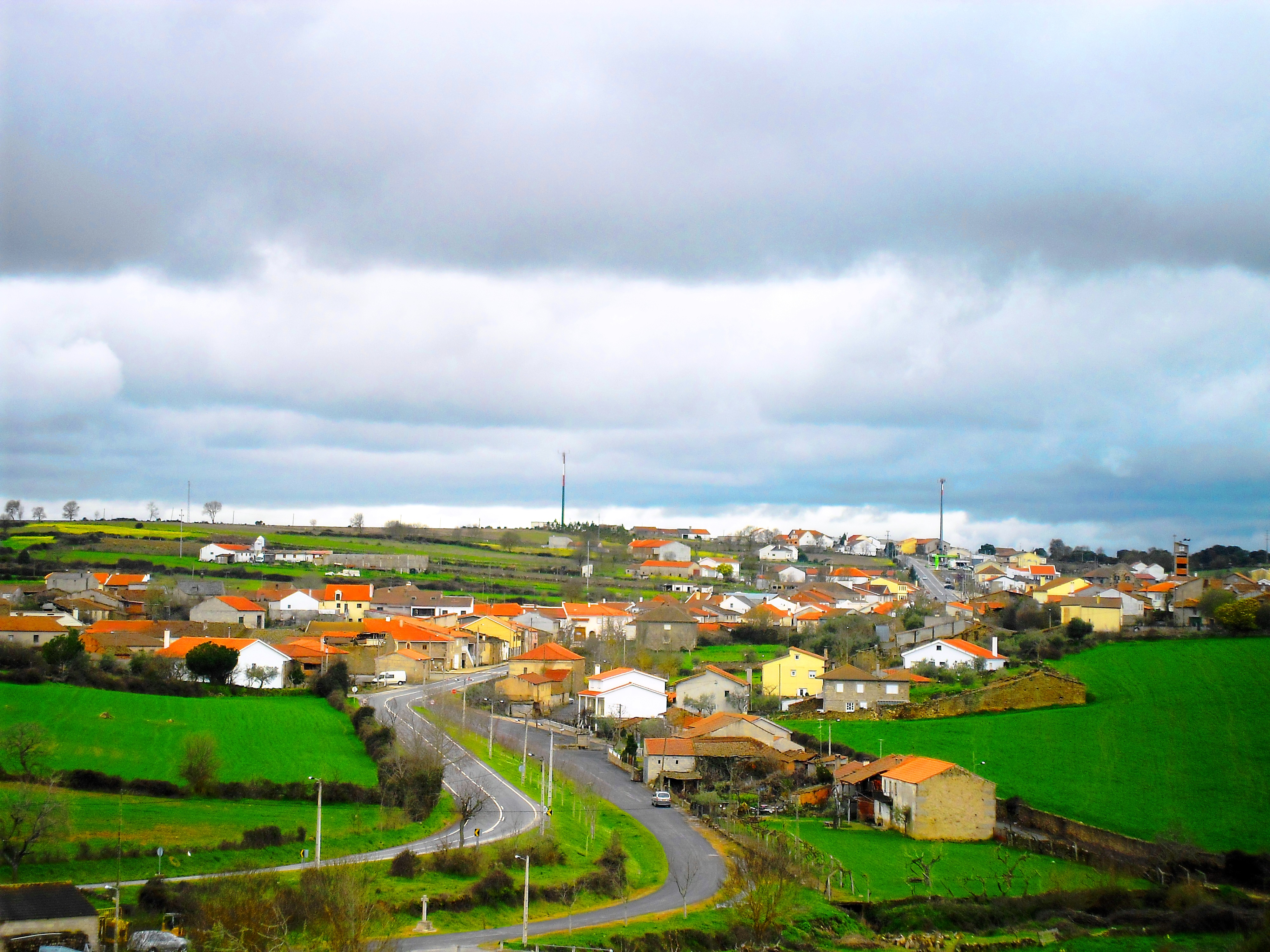 Freguesia de Duas Igrejas, no concelho de Miranda do Douro em Portugal.